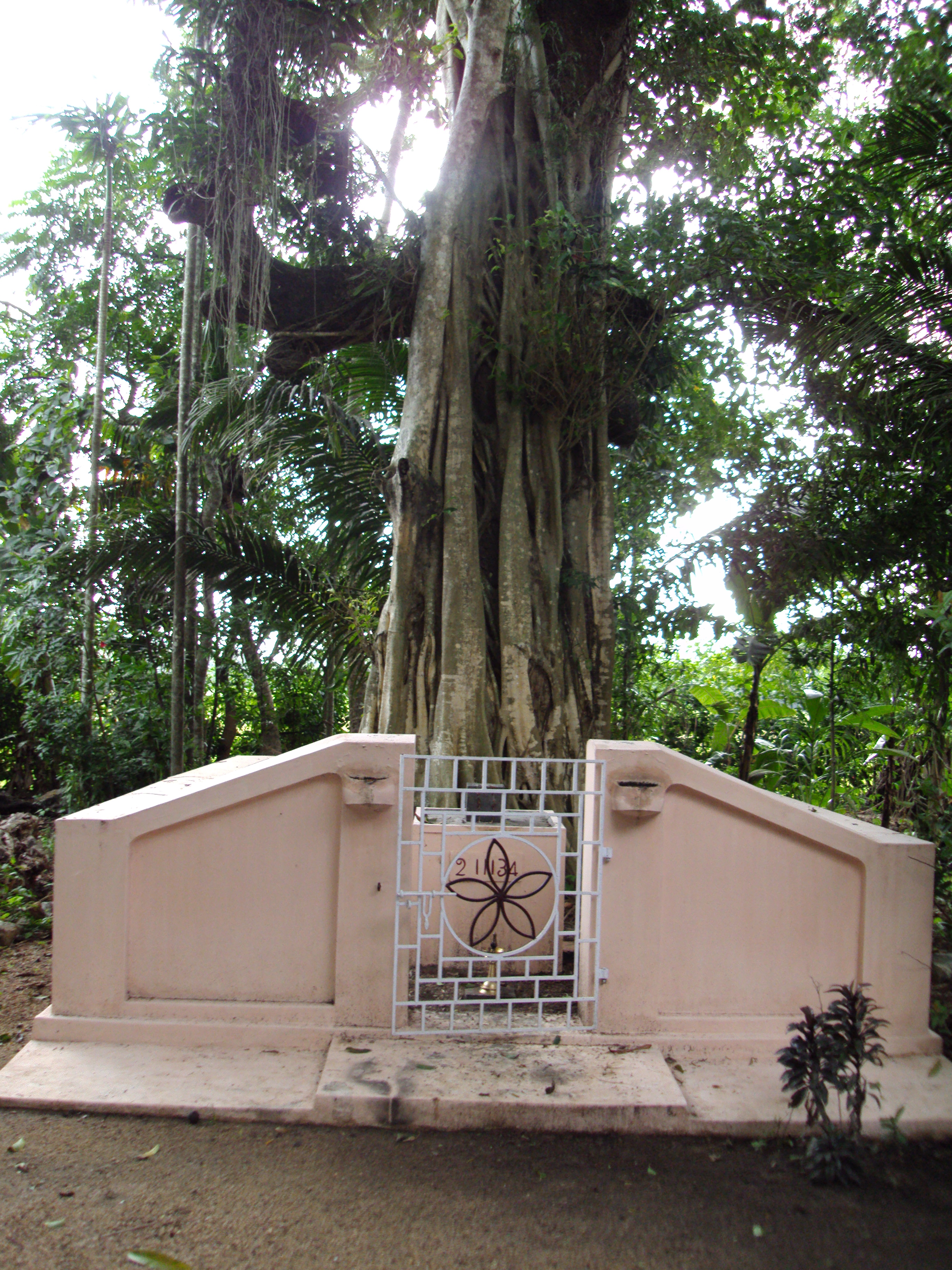 എരവേലിൽ പരദേവ പ്രതിഷ്ഠ